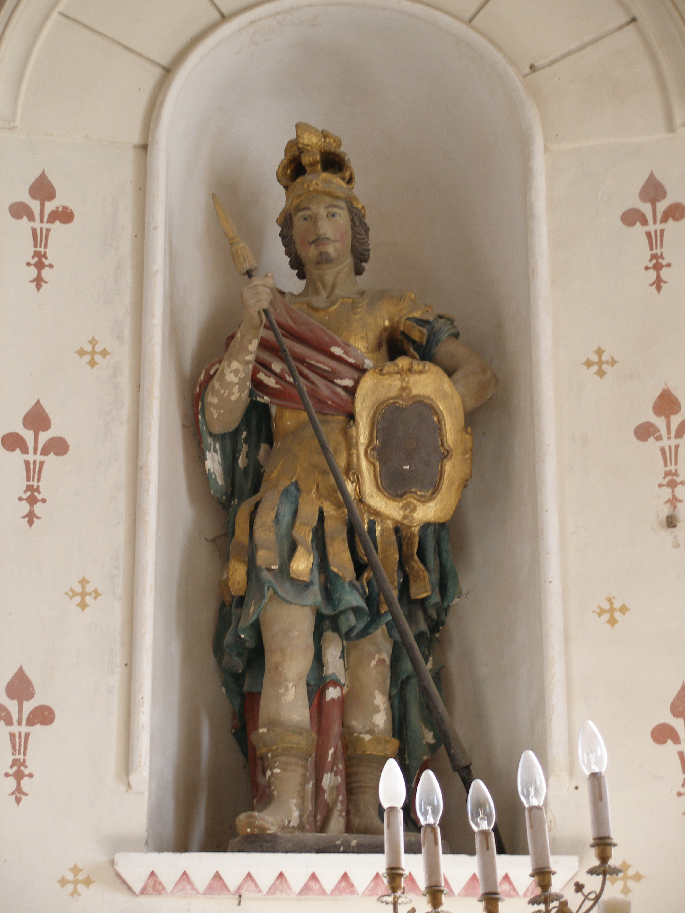 Statue de St Georges dans l'église de Saint-Georges-du-Bois dans le département français de la Sarthe, en juin 2006.